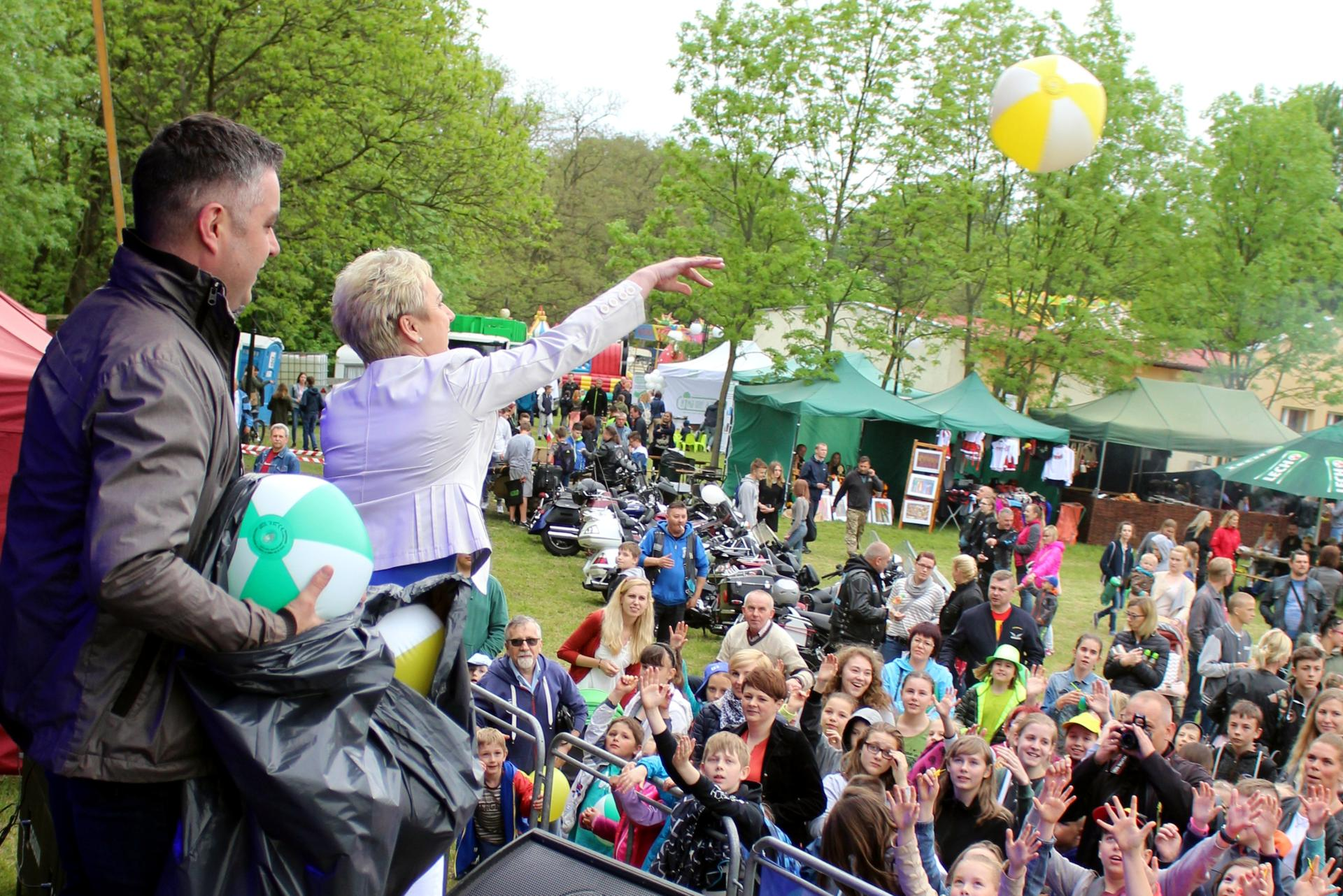 Festyn 'Kłodawska Majówka'